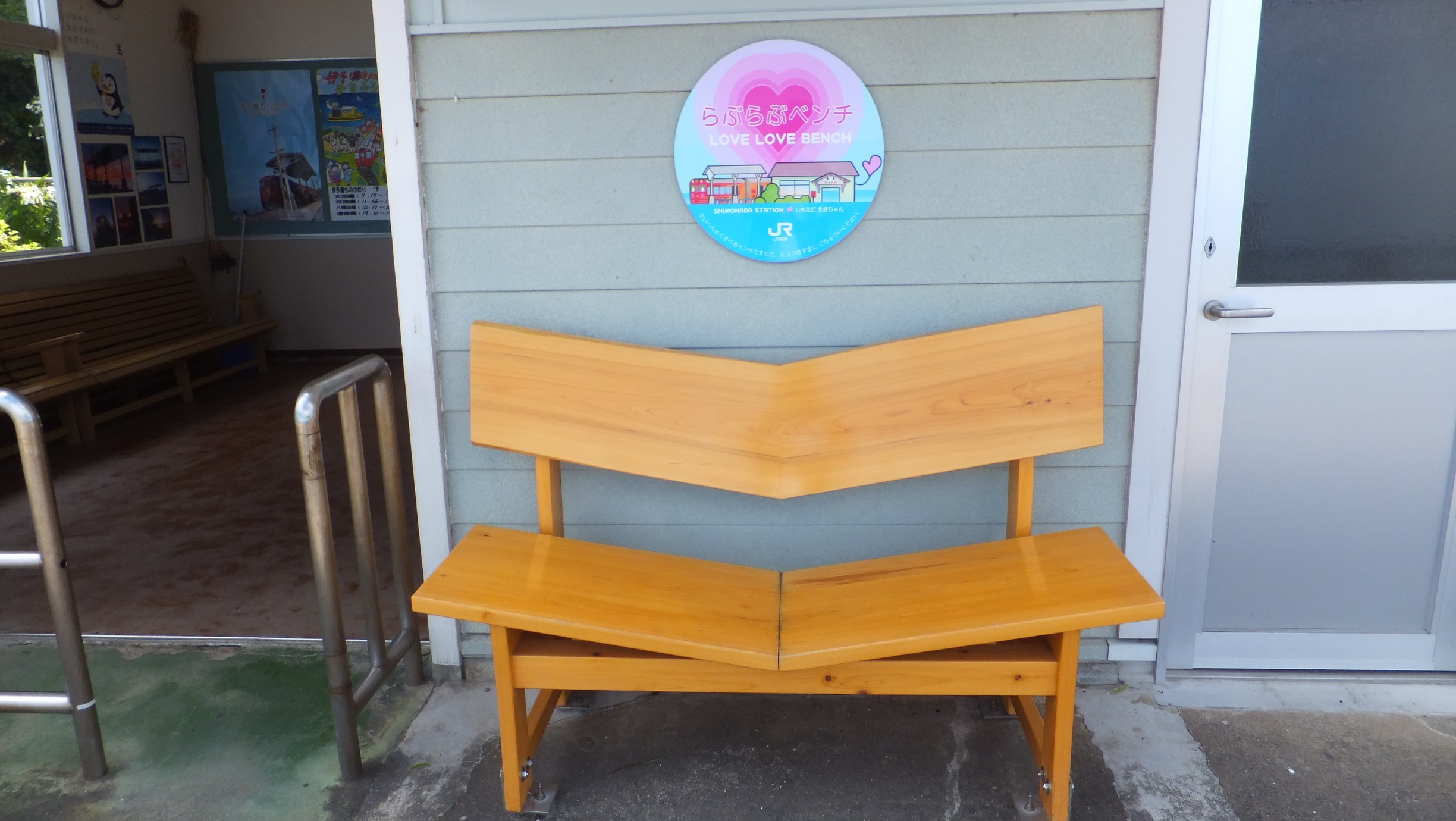 愛媛県伊予市双海町 下灘駅 らぶらぶベンチ